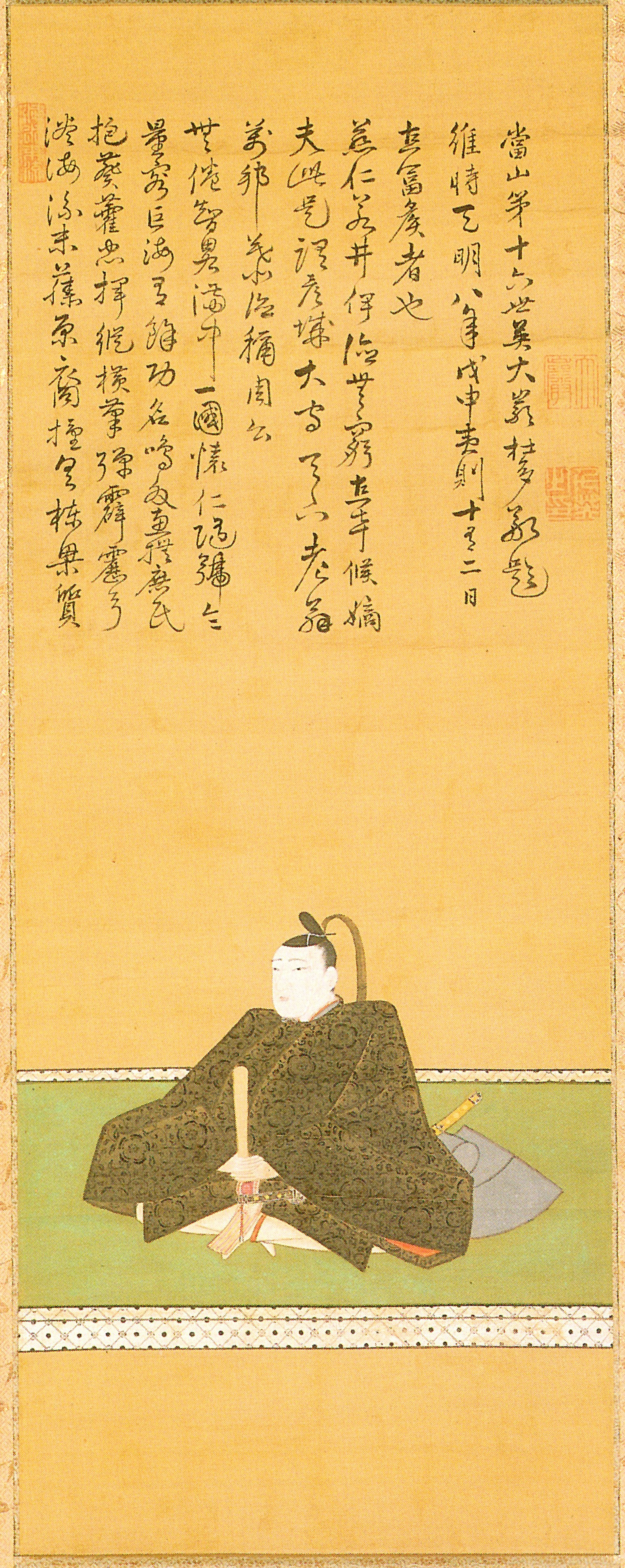 井伊直富の肖像。